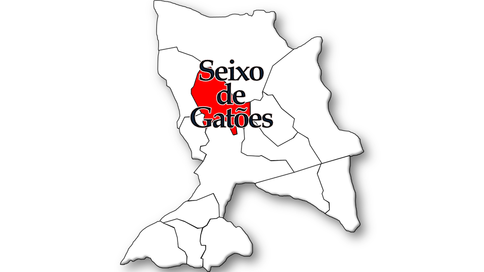 População